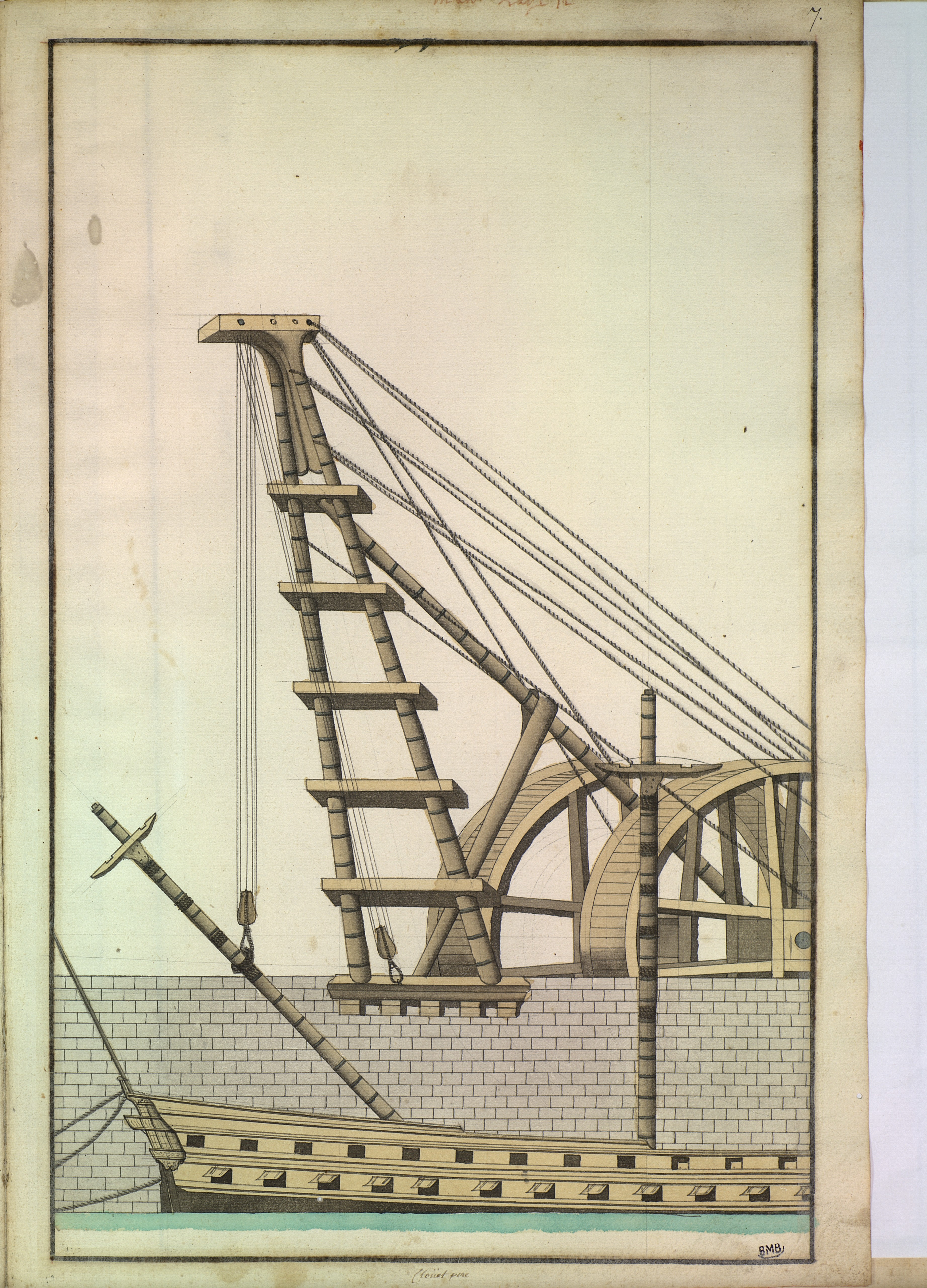 Mise en place d'un mât dans un port au XVIIIè siècle. Image extraite de Recueil de toutes sortes de machines, d'outils, et d'ustensiles en usages pour la construction et carenne des vaisseaux, et de tout ce qui a raport à leurs armements dans un arsenal de marine. Pr[emie]re partie par Deslongchamps l'ainé, lieutenant des vaisseaux du Roy et du port de Brest en 1763. Plans des hunes, des barres d'hunes, chuquets, barres de peroquet et autres pièces concernant la construction de la mature des vaisseaux 1767. Manuscrit numérisé de la bibliothèque municipale de Brest, France.